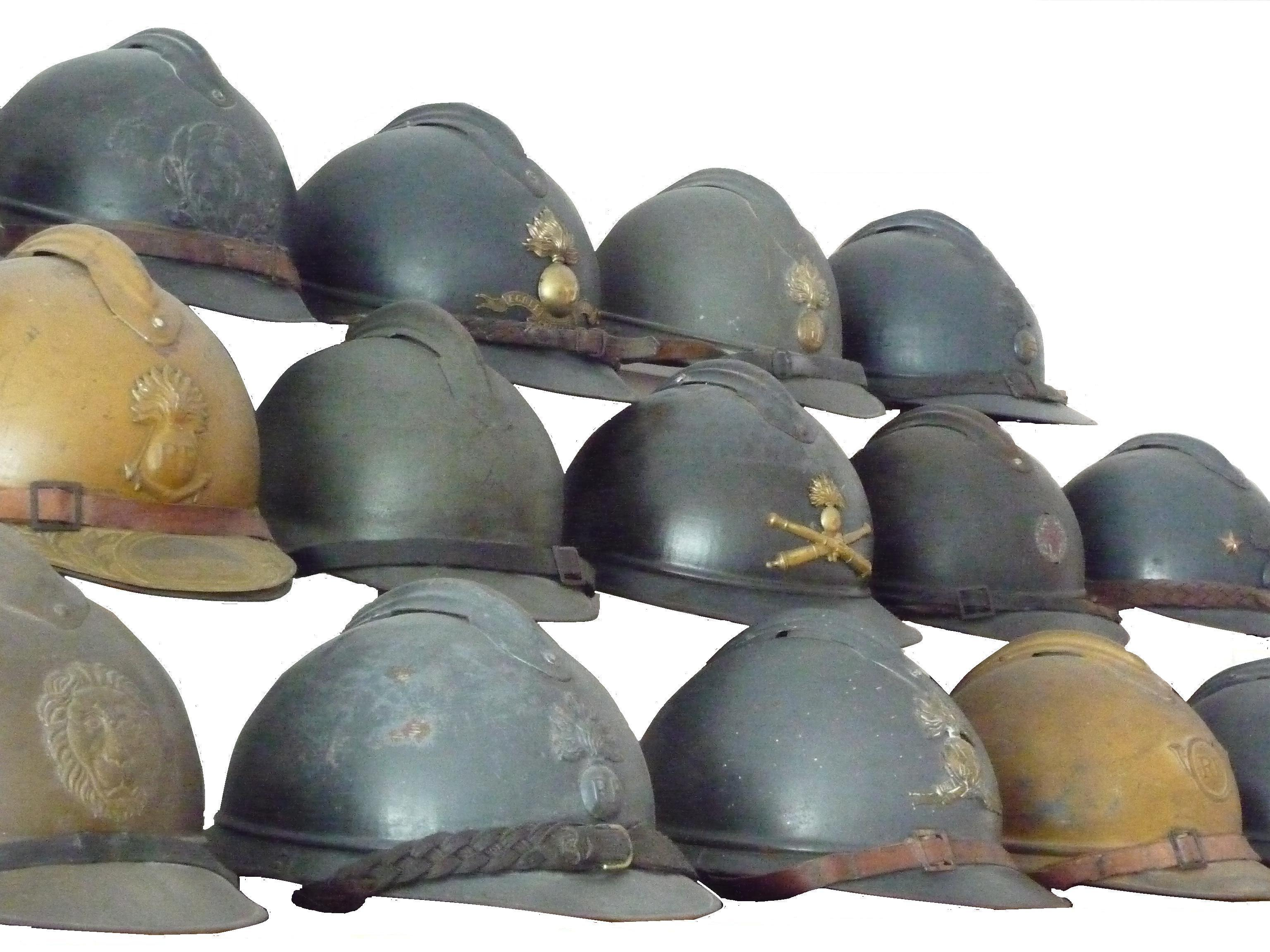 Collection de casques Adrian